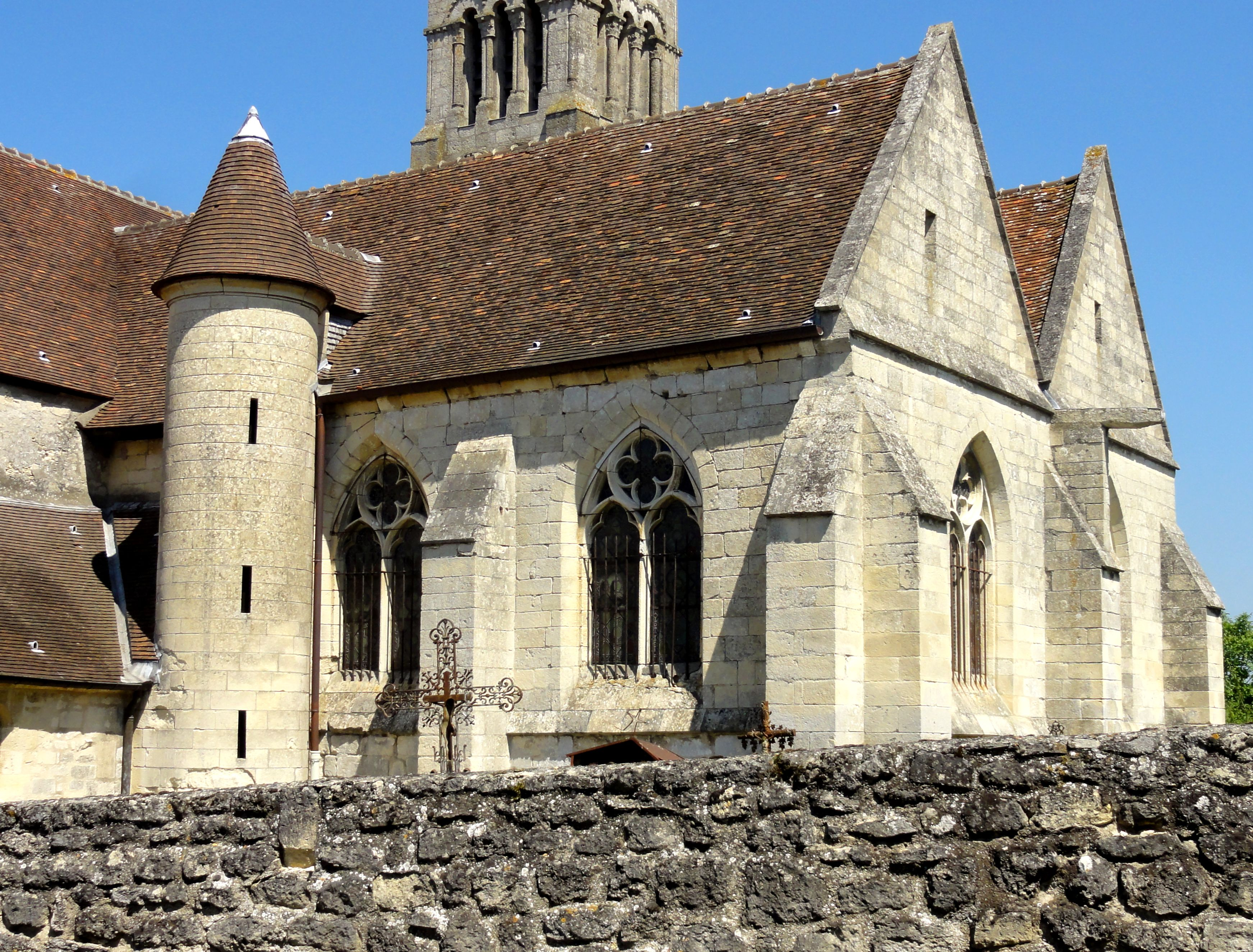 Chapelles sud, côté sud-ouest.